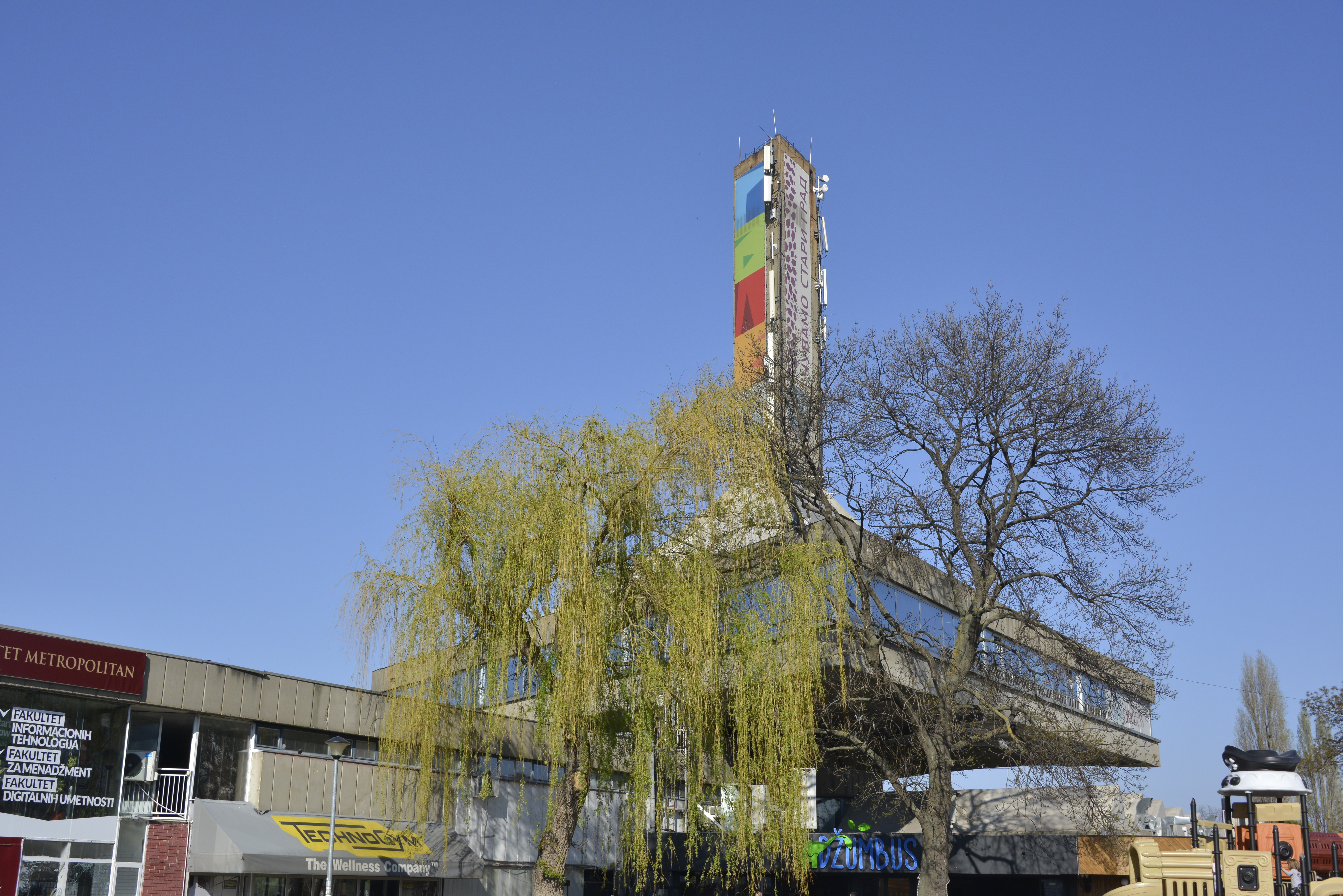 SC Milan Gale Muskatirovic